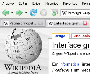 Interface tabulada do Mozilla Firefox